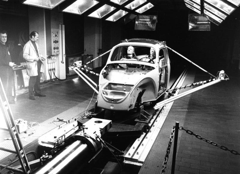 VW-Werk, Wolfsburg Forschung und Entwicklung PKW-Versuch/Abt. Sicherheit, Bendix-Horizontalbeschleunigungsschlitten zur Prüfung von Rückhaltesystemen unter Crash-Bedingungen mit seitlich montierten Hochgeschwindigkeitskameras